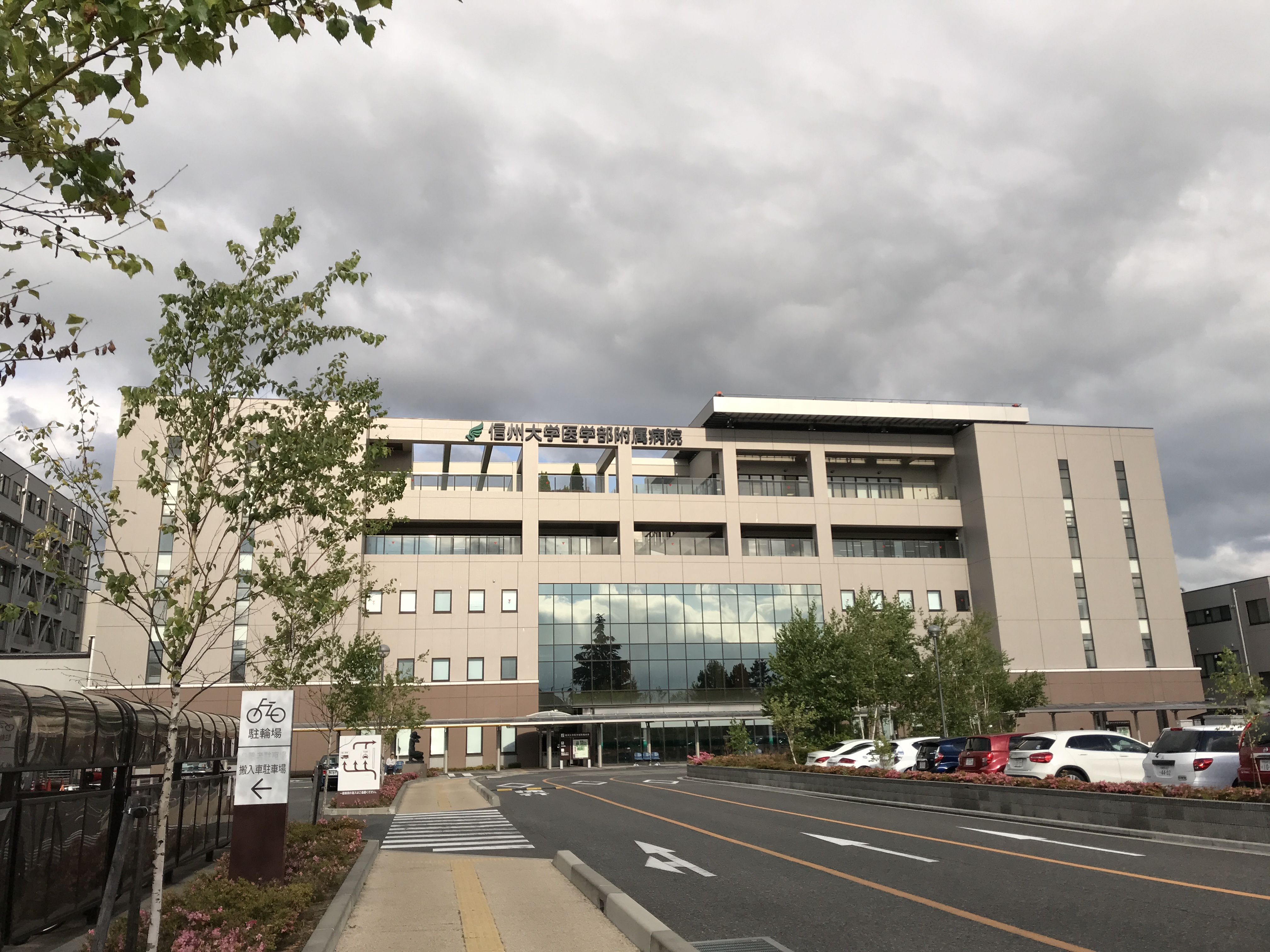 信州大学医学部付属病院の外観。